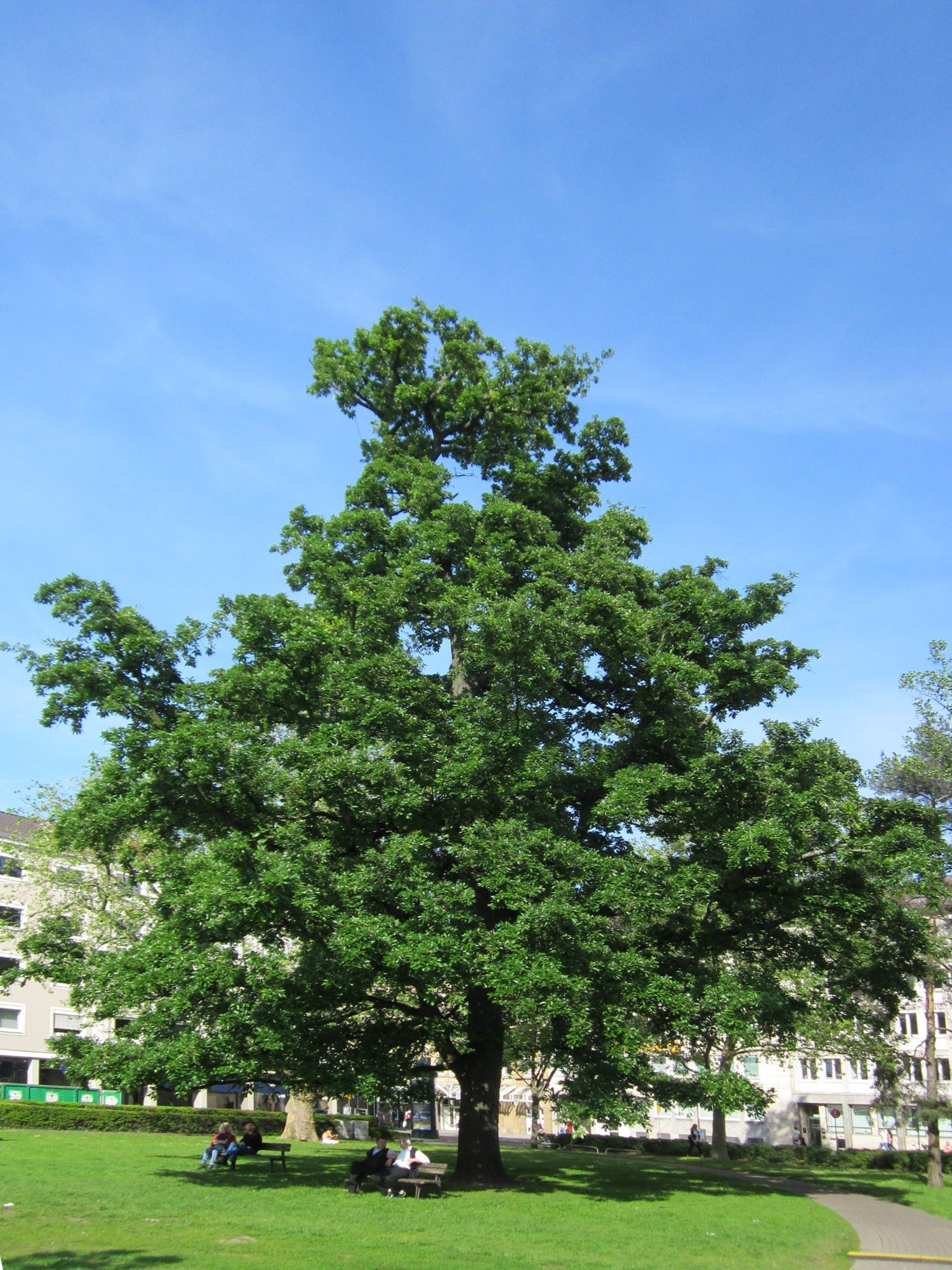 Zerreiche (Quercus cerris) am Friedrichsplatz (Karlsruhe)